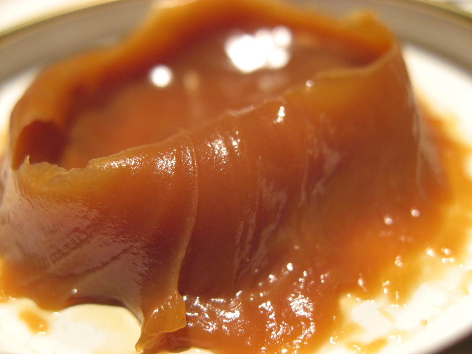 Dulce de leche in a plate